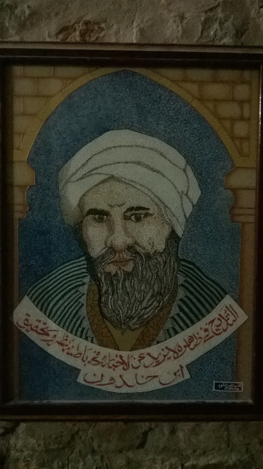 makhzen Dar Lasram, la médina de Tunis مخزن دار لصرم , مدينة تونس العتيقة